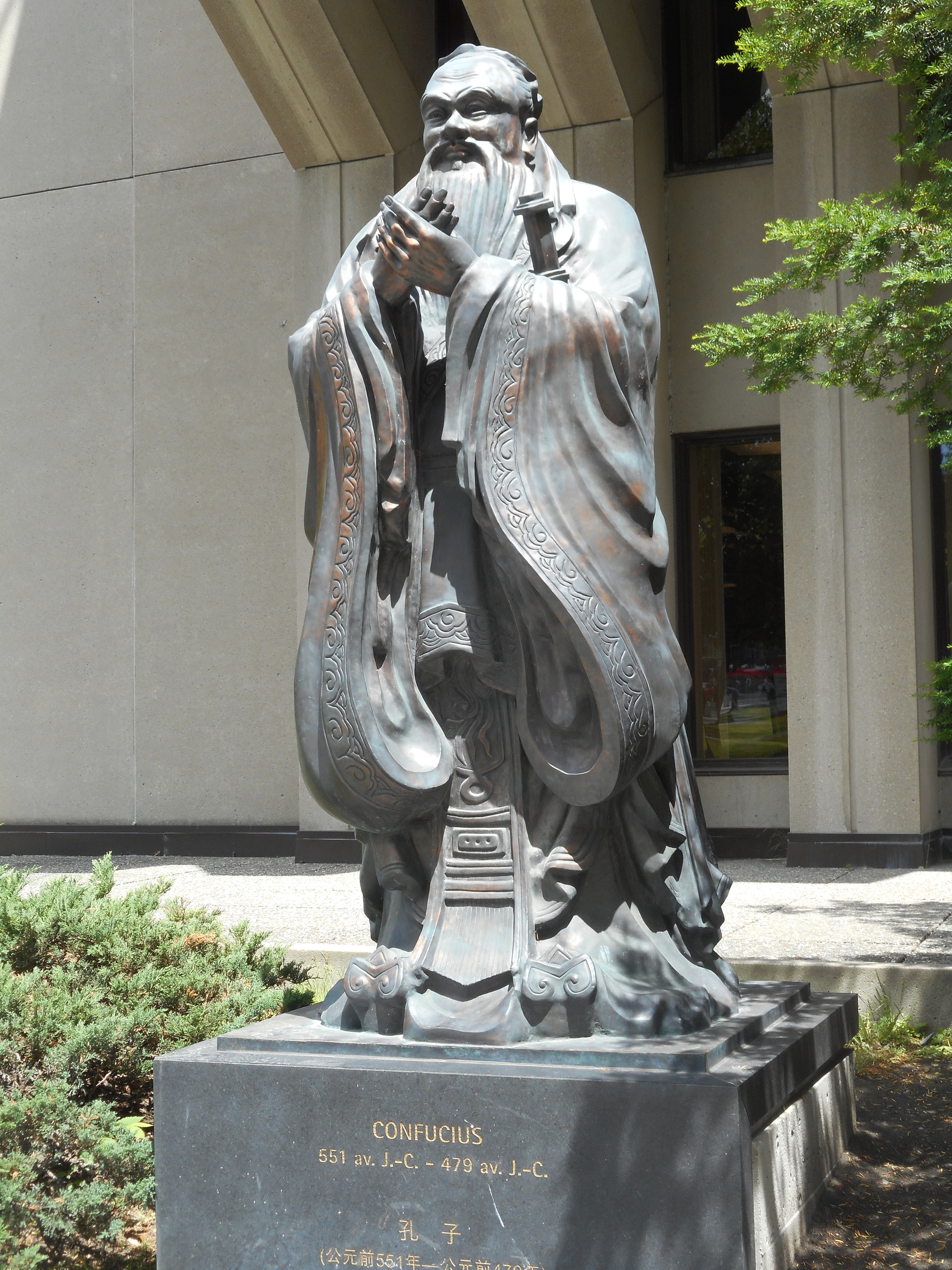 Monument Confucius, à l'intersection de la place George-V Est et de la Grande Allée, Québec, cadeau de la province chinoise de Shandong au Québec, dévoilé en 2009